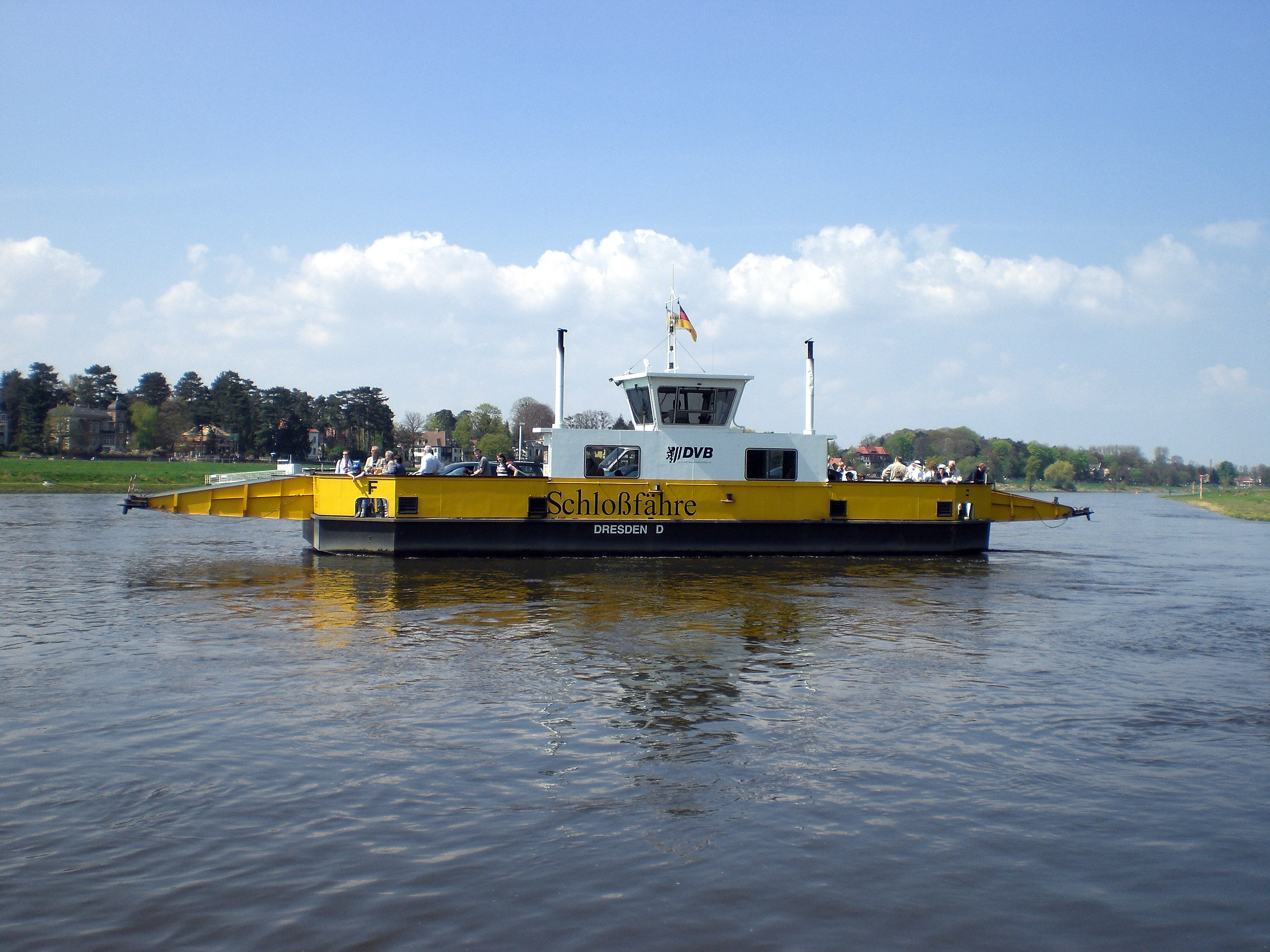 Elbfähre Kleinzschachwitz–Pillnitz („Schloßfähre“) in Dresden